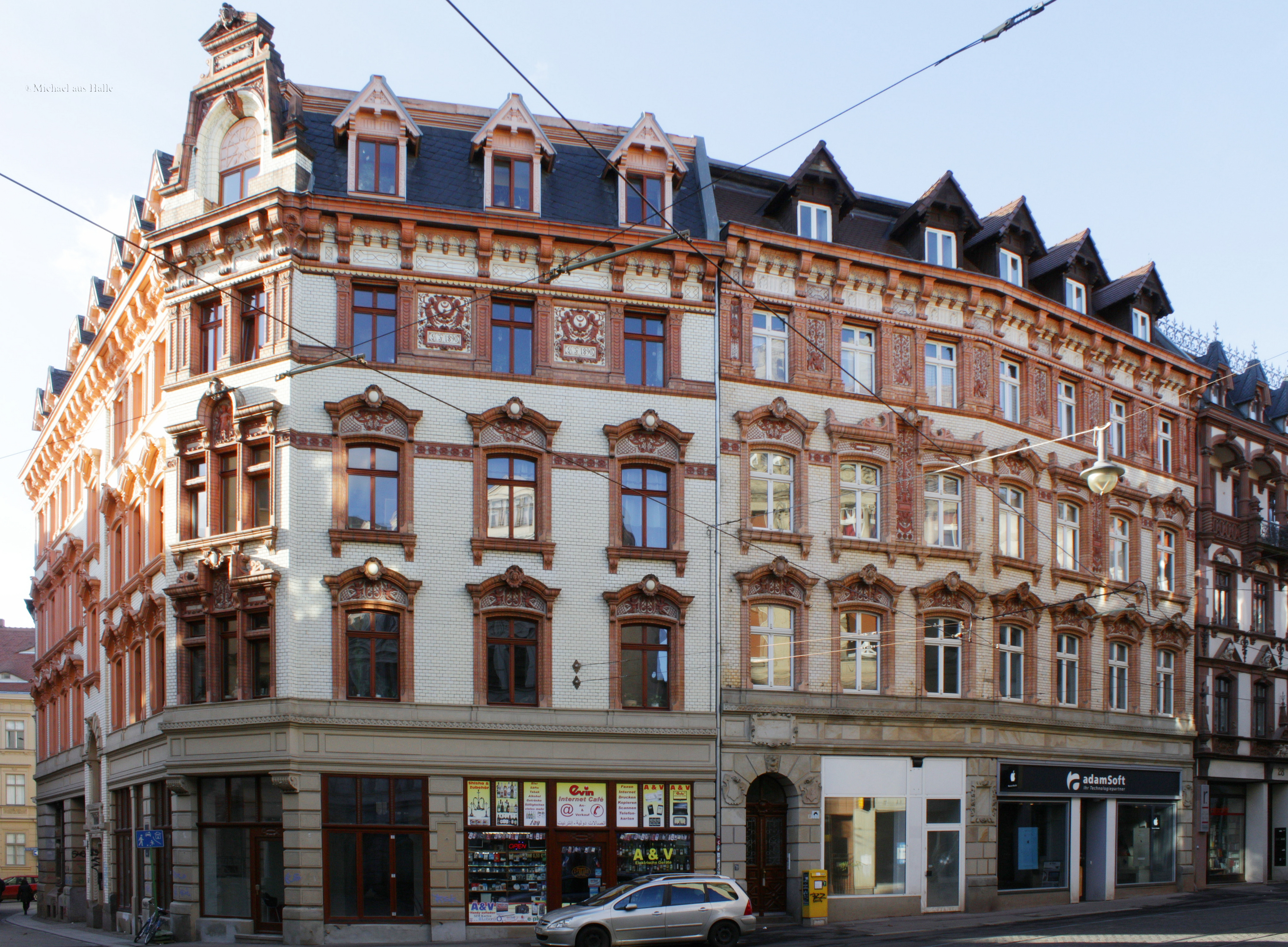 Große Ulrichstraße 26 und 27, Halle (Saale)